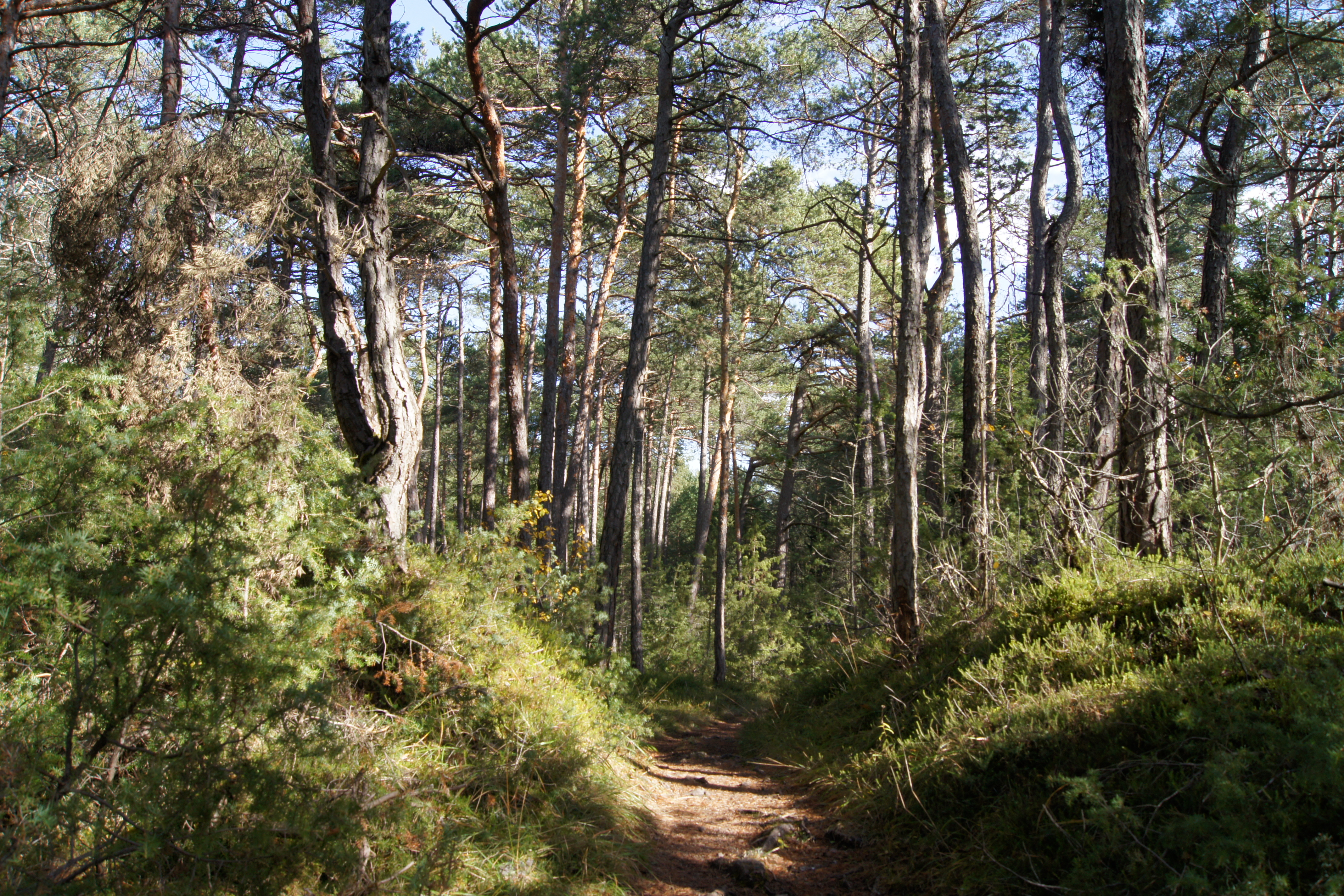 Föhren und Wacholder im Tiroler Bergsturzwald Forchet, nicht unter Schutz stehender Teil (Haiminger Forchet)